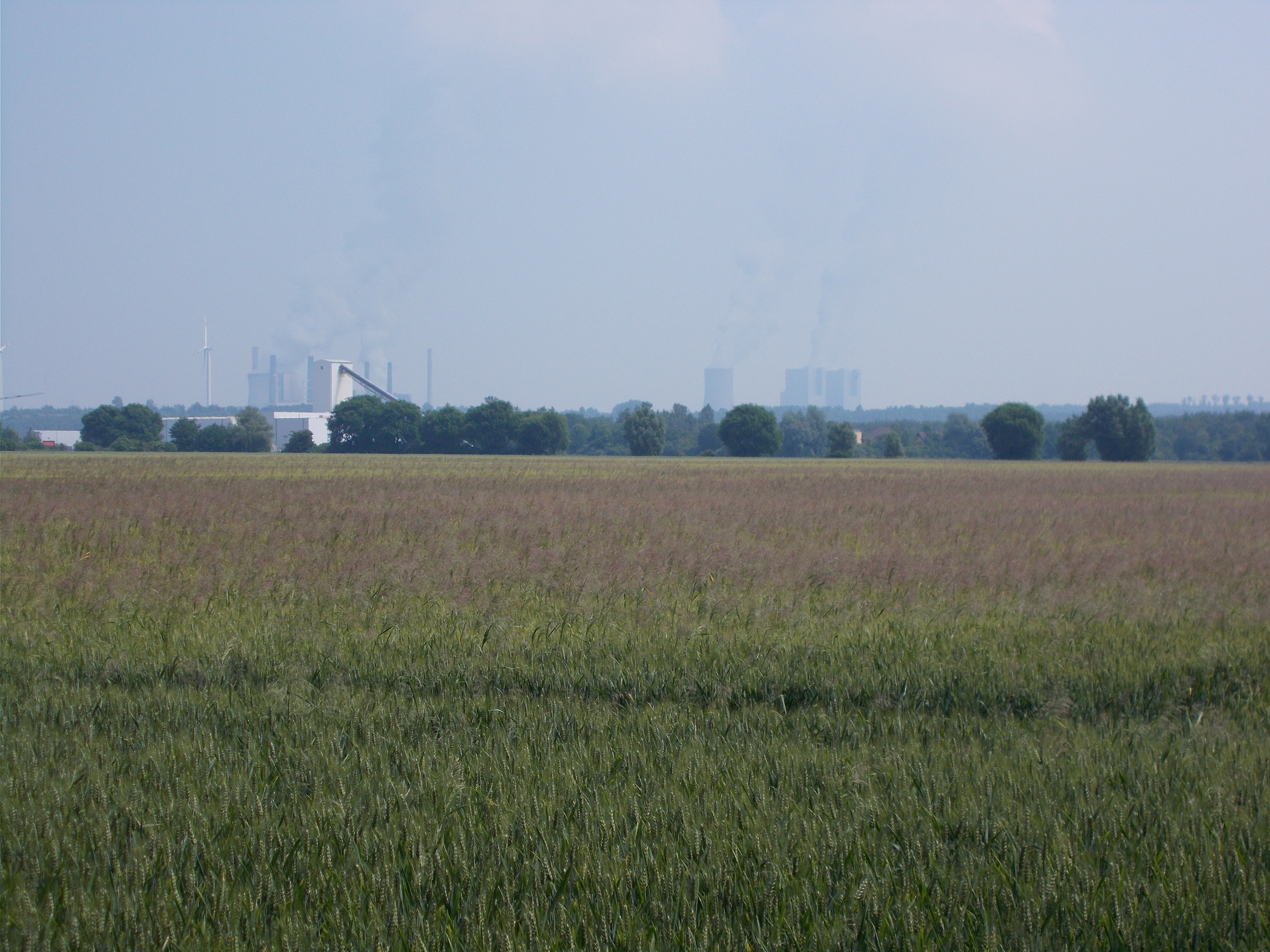 Feld am Wanderweg mit Aussicht auf das Industriegebiet. Dort, wo die Bäume stehen, war einmal ein Jüdischer Friedhof. Er wurde durch den Kohleabbau zerstört.